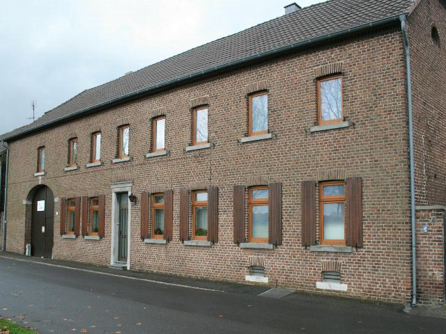 Backsteinhof in Wegberg-Harbeck